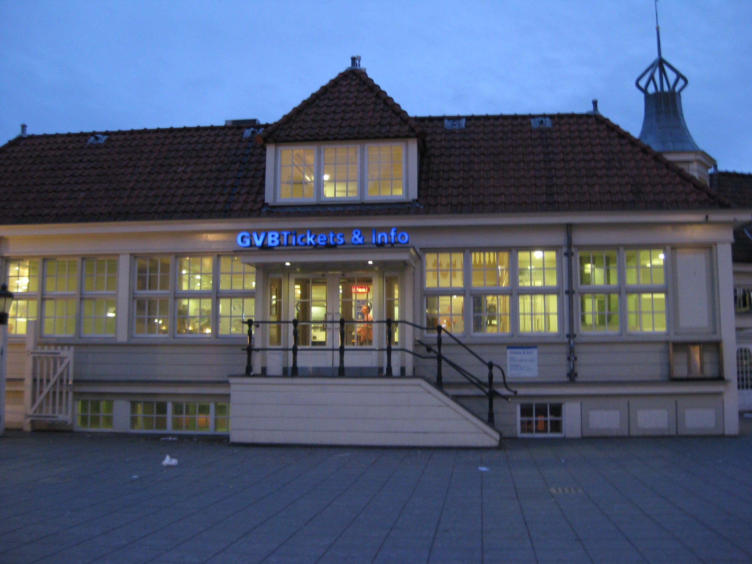 GVB Ticketshop bij het Centraal Station in Amsterdam